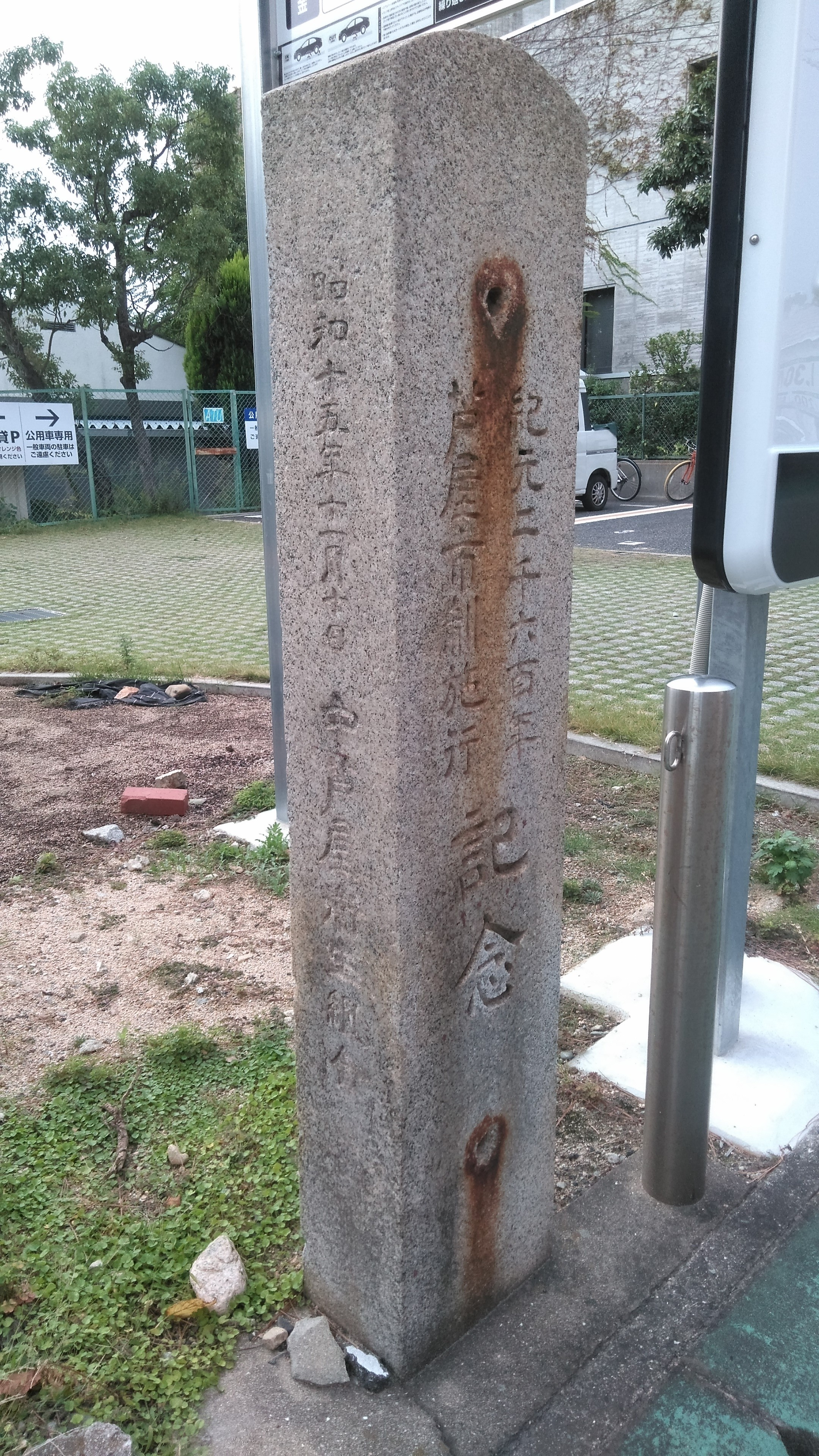 紀元二千六百年の芦屋市制記念の国旗掲揚台